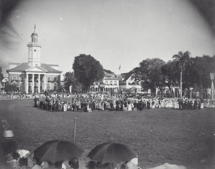 Foto. Cantate door een groep kinderen tijdens de kroningsfeesten op het Gouvernementsplein